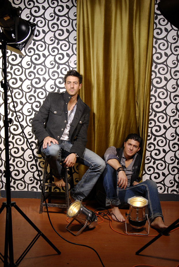 Hermanos y magos